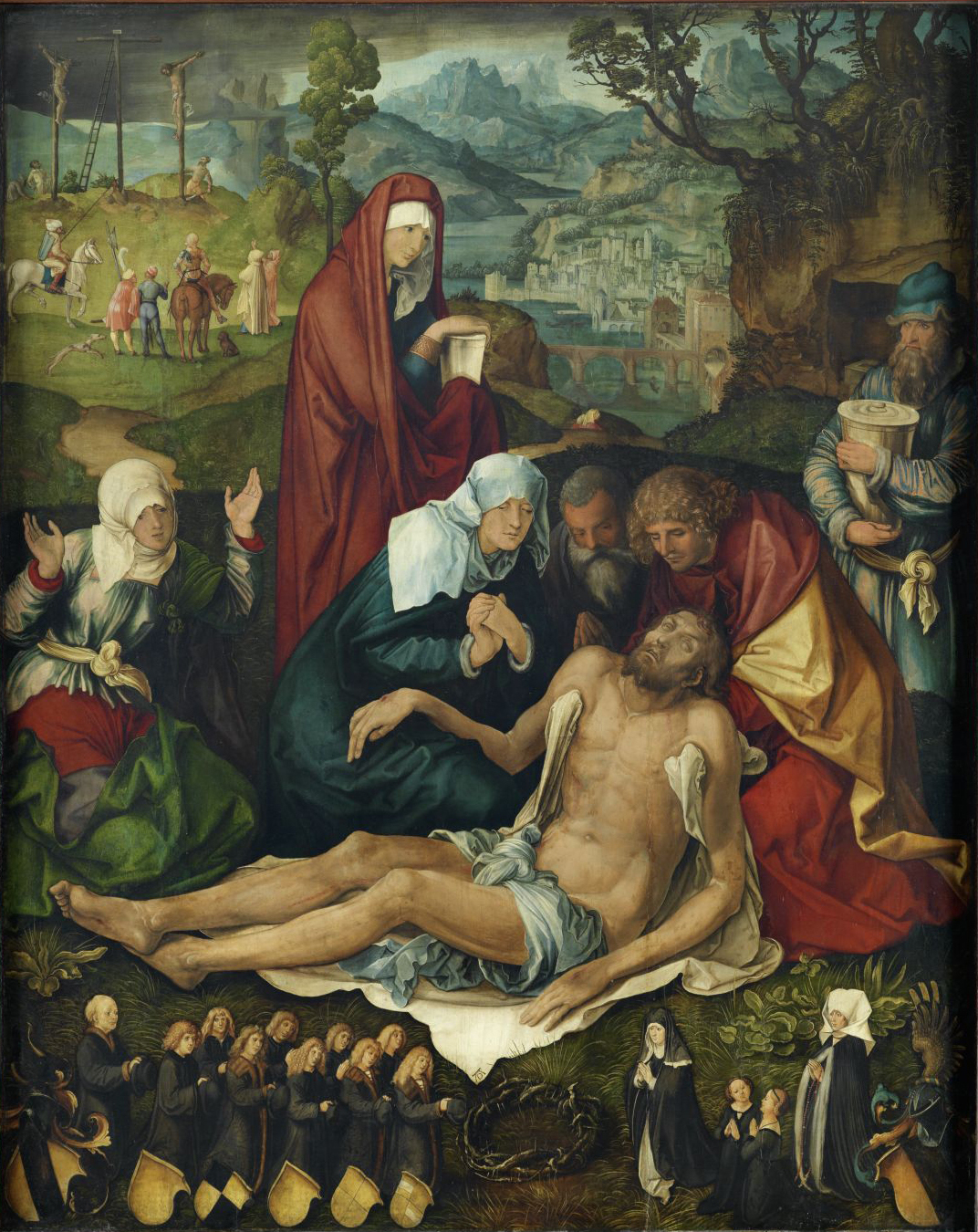 Johannes fasst den Hl. Leichnam